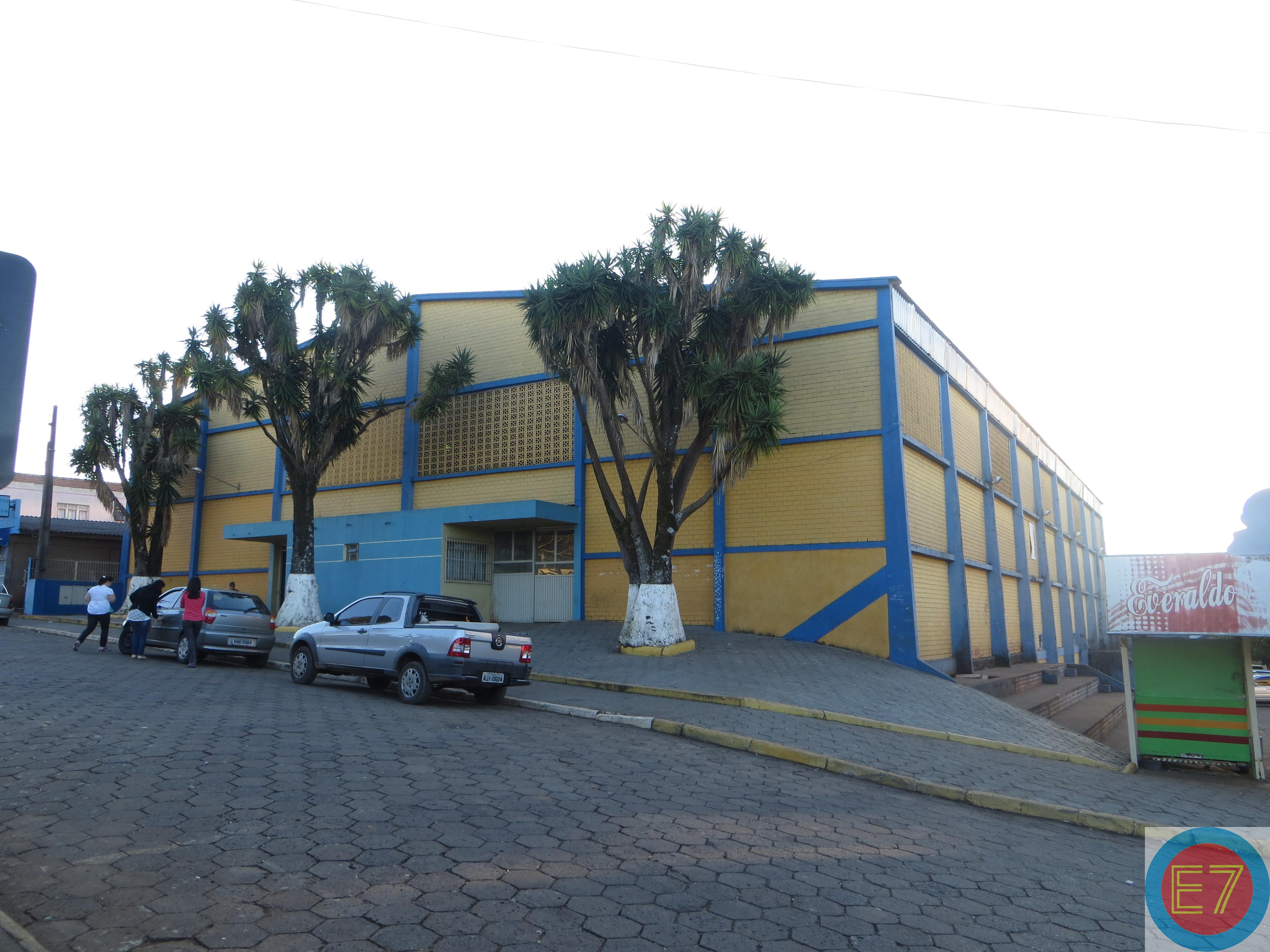 Ginásio de Esportes de Curiúva, Estado do Paraná, Brasil.